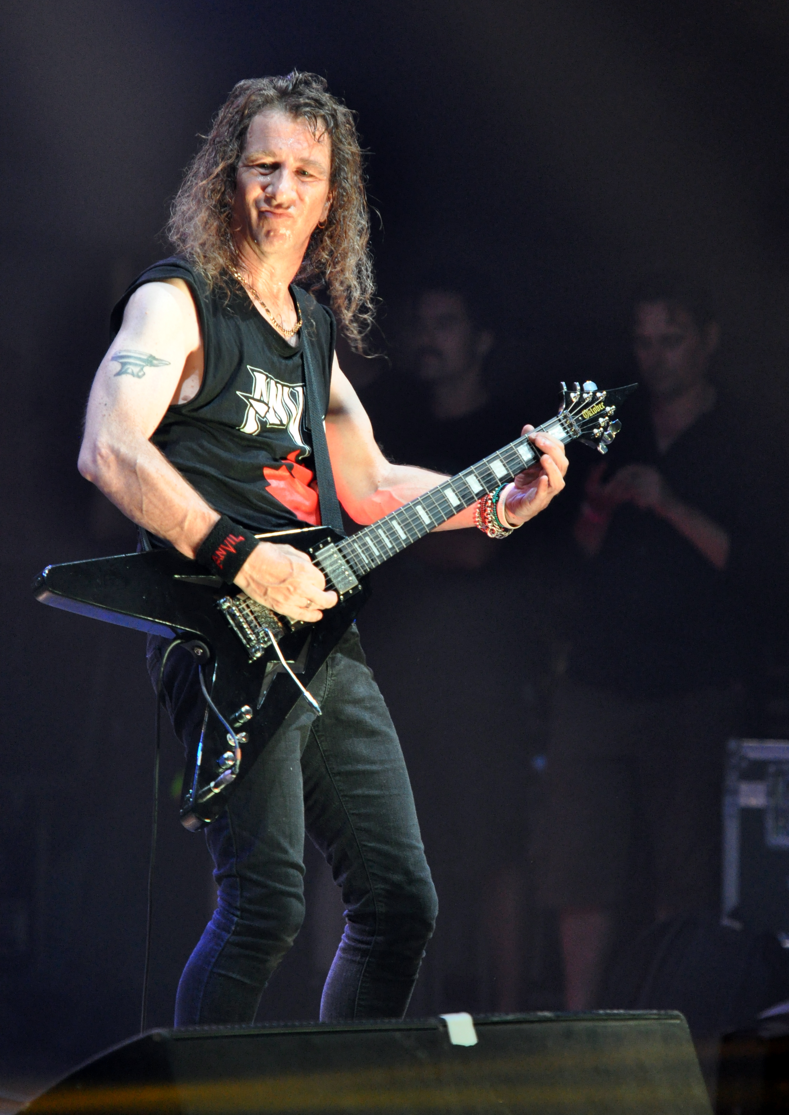 Anvil at Wacken Open Air 2013